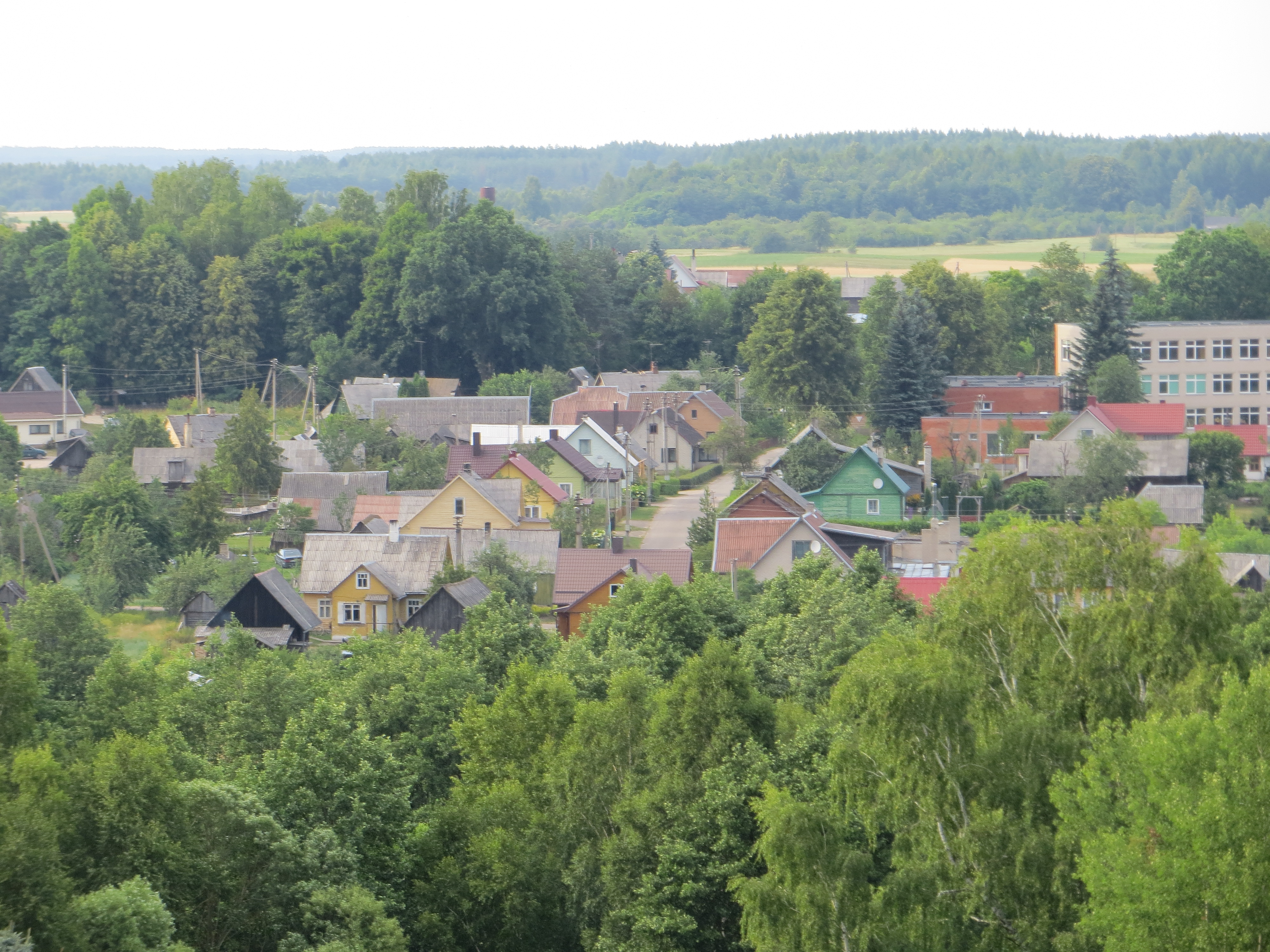 Kapčiamiesčio sen., Lithuania